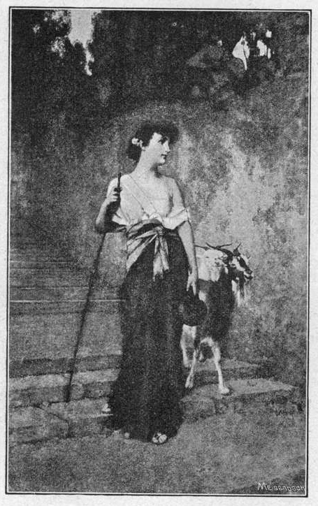 Heimkehr